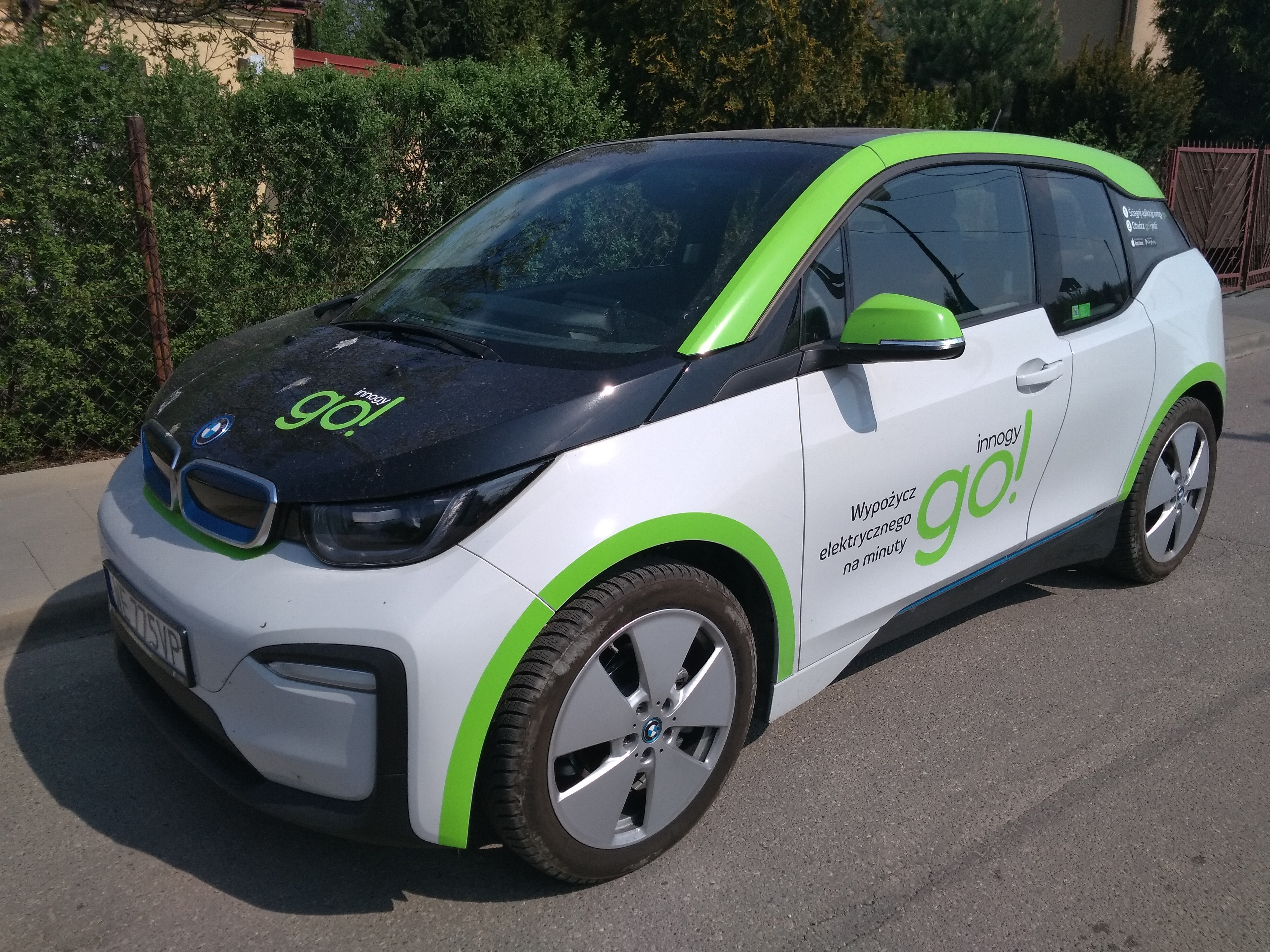 Elektryczny BMW i3 w ramach usługi car charingu innogy go.